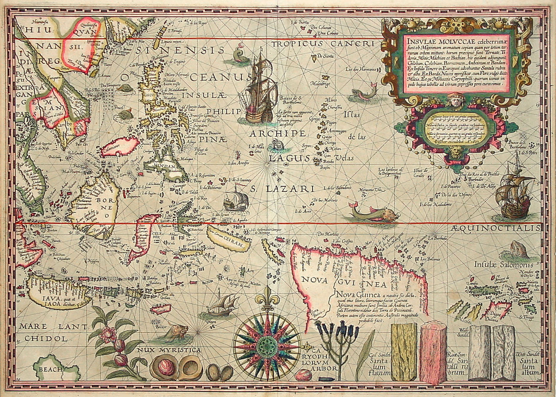 title= size=38x53cm; 1e druk 1592, deze druk 1617.